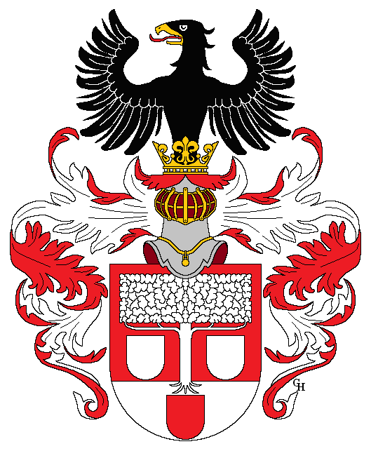 Wappen des österreichischen Malers August Schaeffer (1833–1916), verliehen anlässlich seiner Erhebung in den österreichischen Adelsstand als "Edler von Wienwald" 1911. Zeichnung von Gerd Hruška ( Für weitere Informationen zu dieser Standeserhebung siehe (